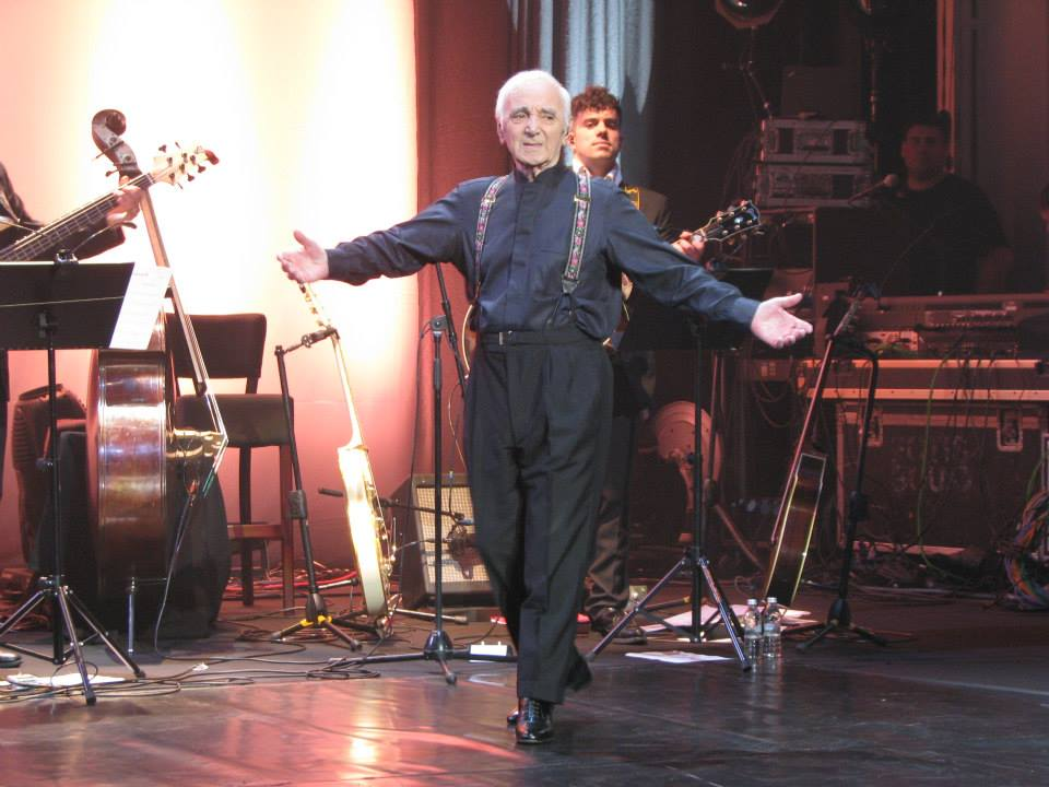 Charles Aznavour (b. May 22, 1924) – French singer